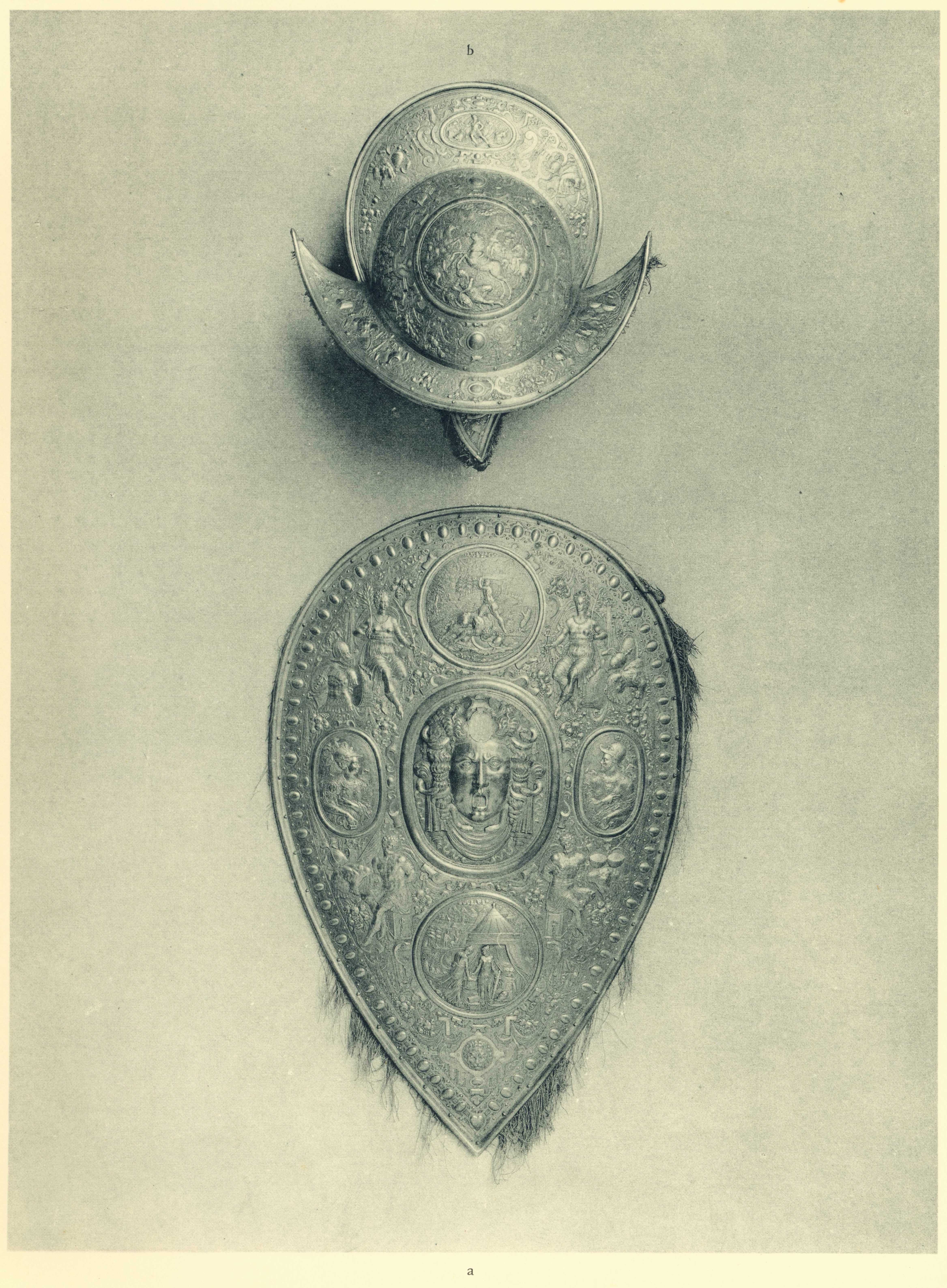 Prunkschild und Morion Kurfürst Christians I. von Sachsen (1560–1591)